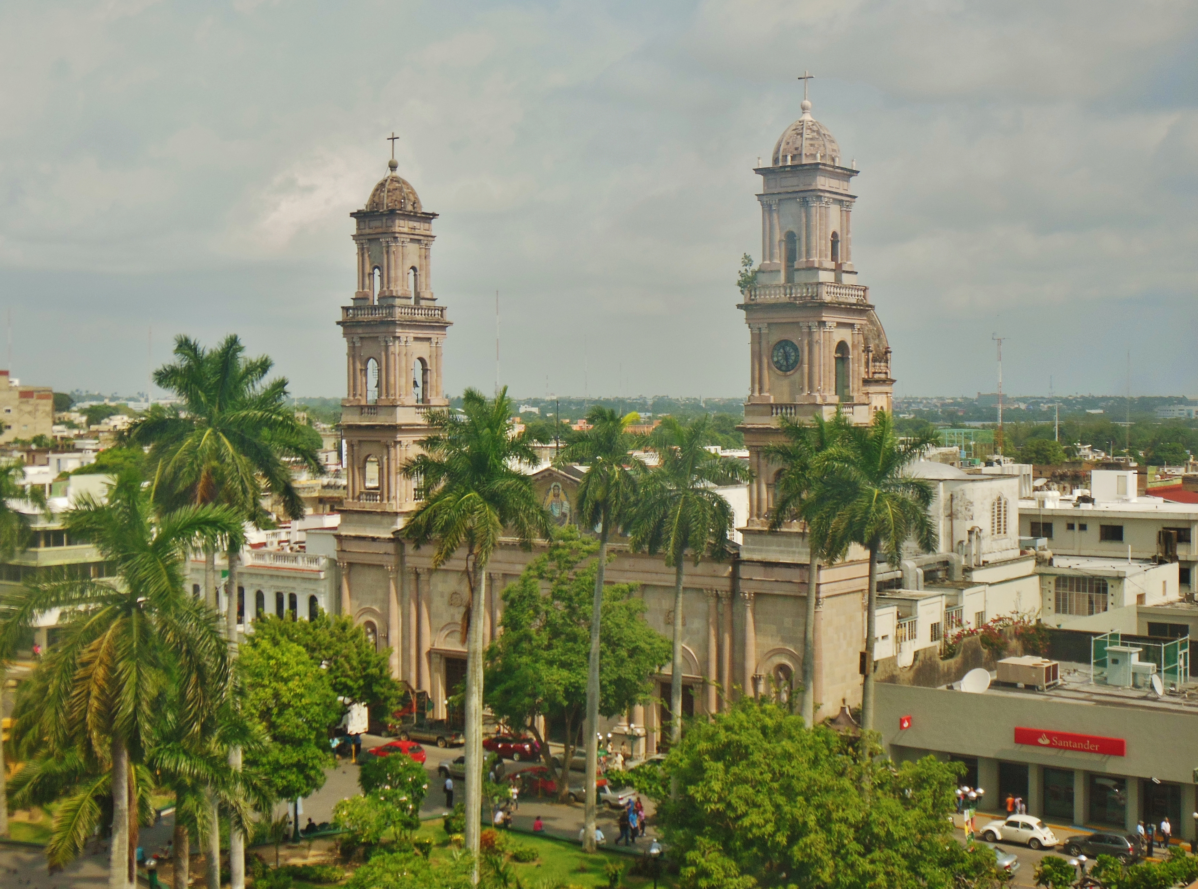 La catedral de la Inmaculada Concepción es sede de la Diócesis de la Ciudad y Puerto de Tampico.